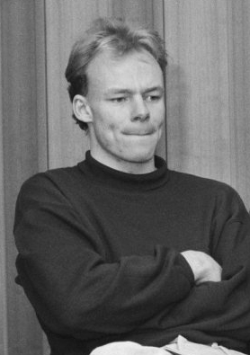 Anne Jan Portijk